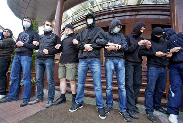 Протестующие в проведении "Славянского гей-прайда 2010"